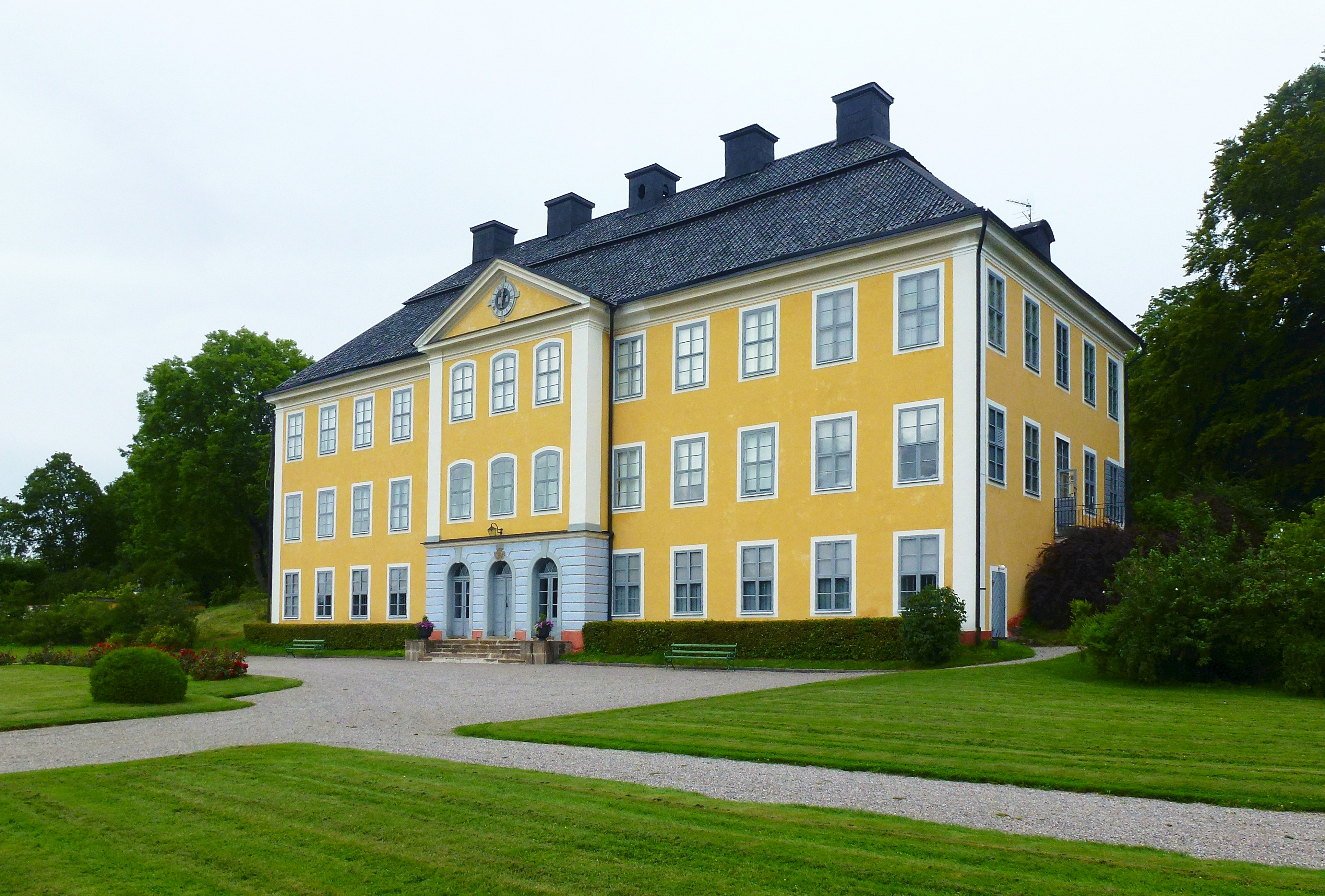 Björksunds slott, fasad mot väst